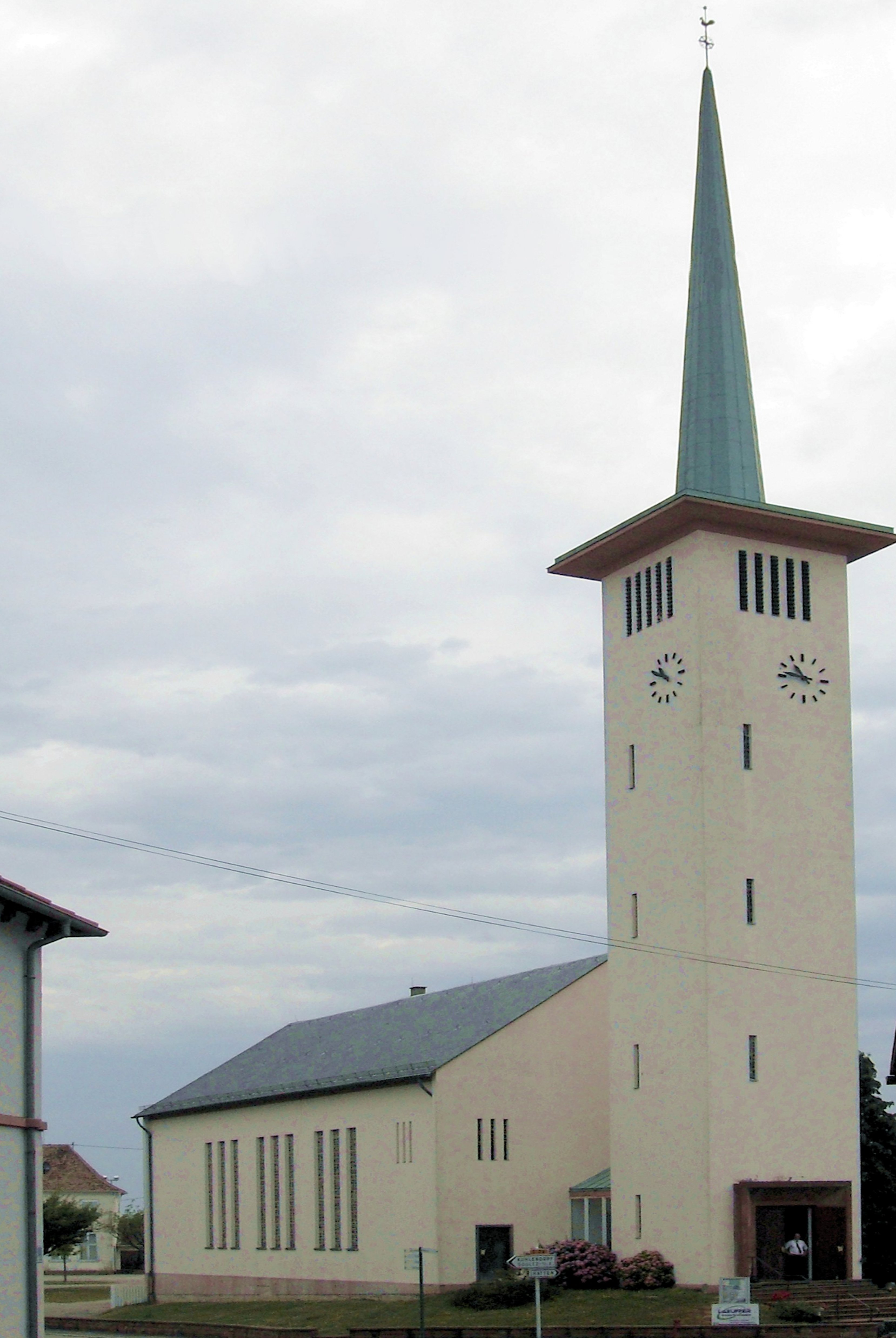 Le Temple Protestant à Rittershoffen